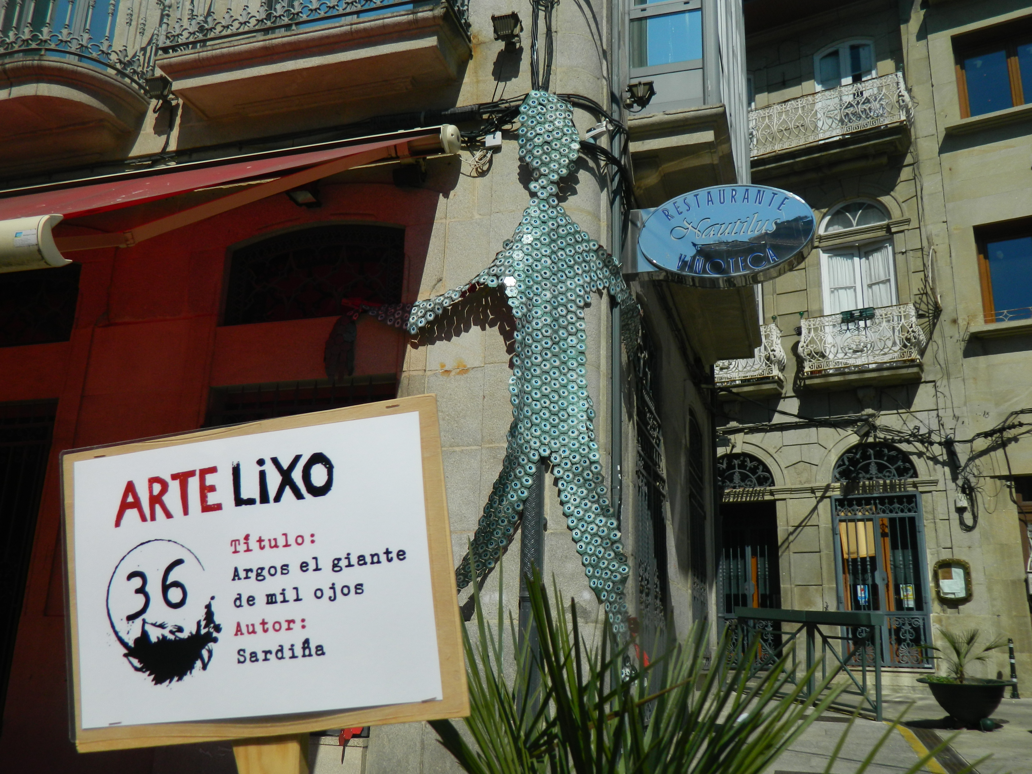 Obra de Arte Lixo, en Redondela.